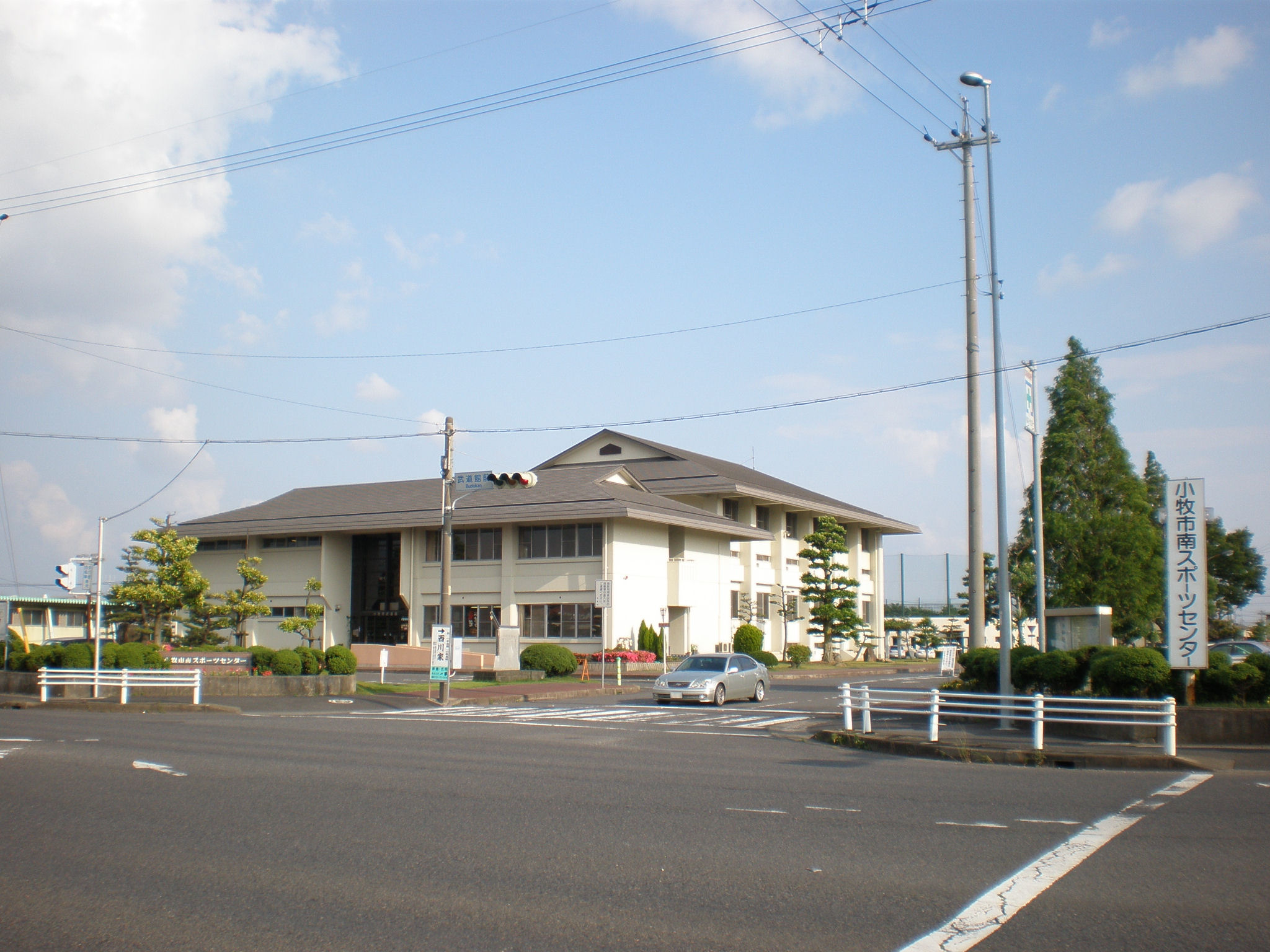 愛知県小牧市にある小牧市南スポーツセンター